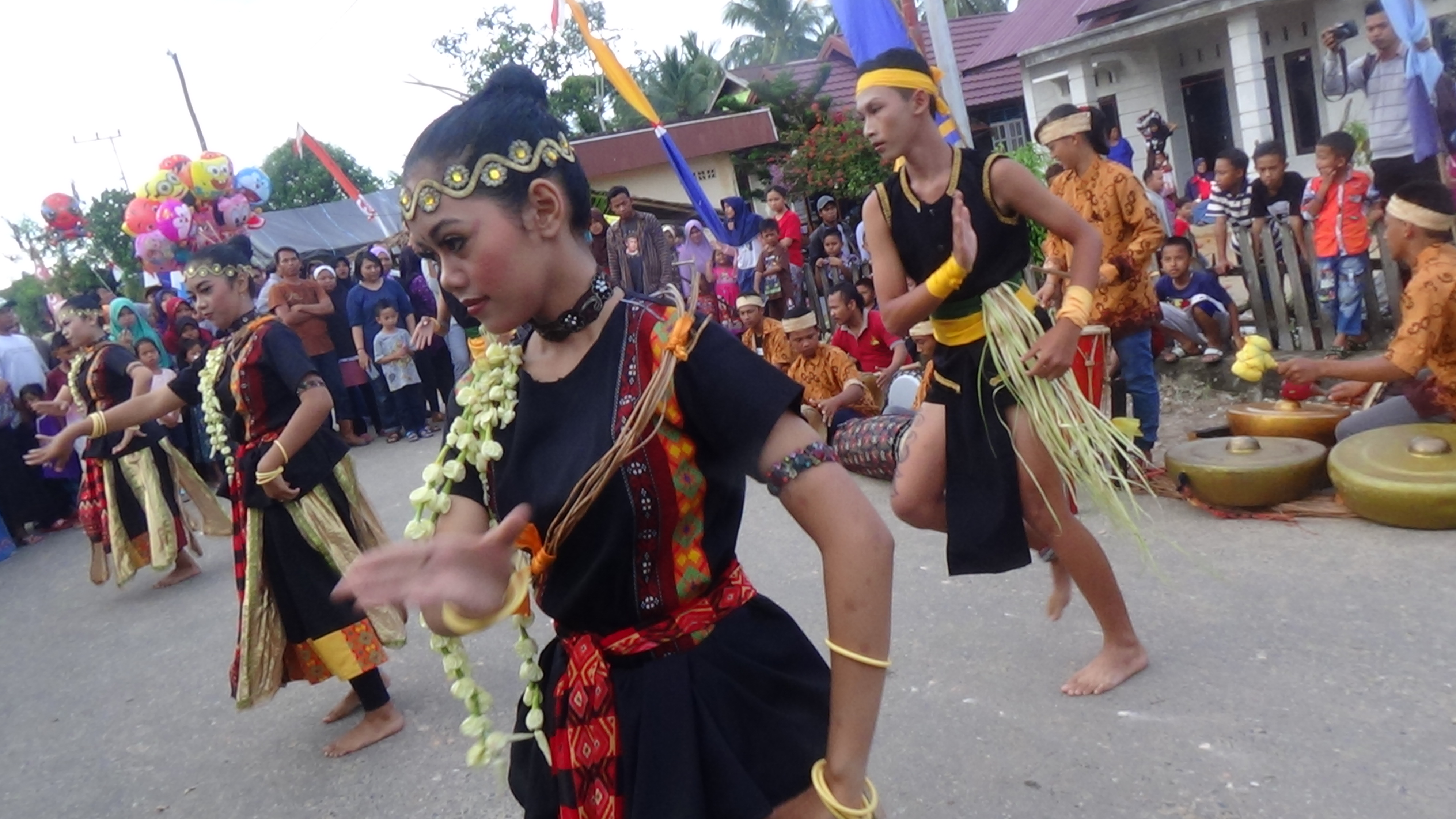 Street Performance pada pagelaran Buen Festifal di Desa Bangun Mulya